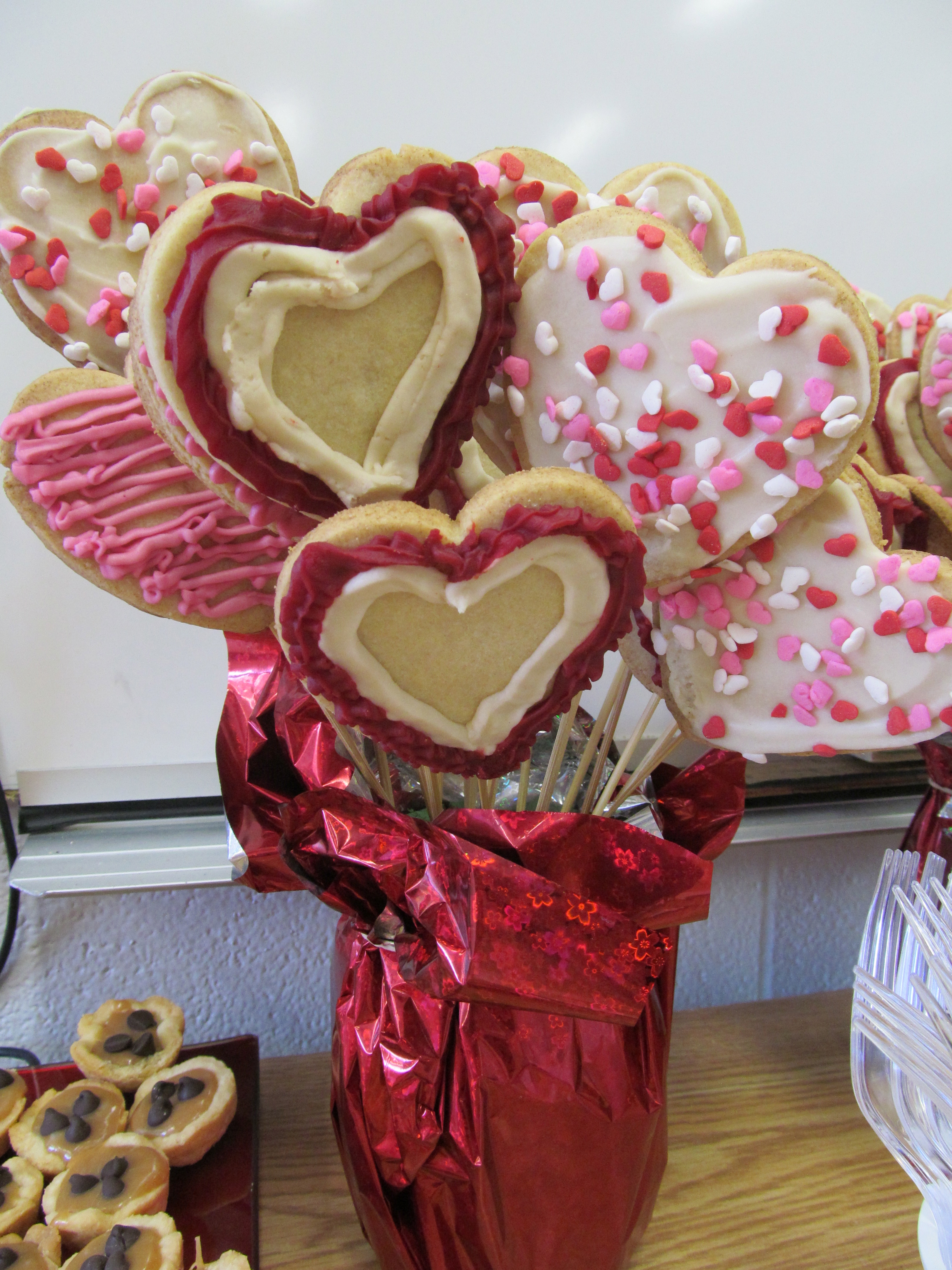 A cookie bouquet.